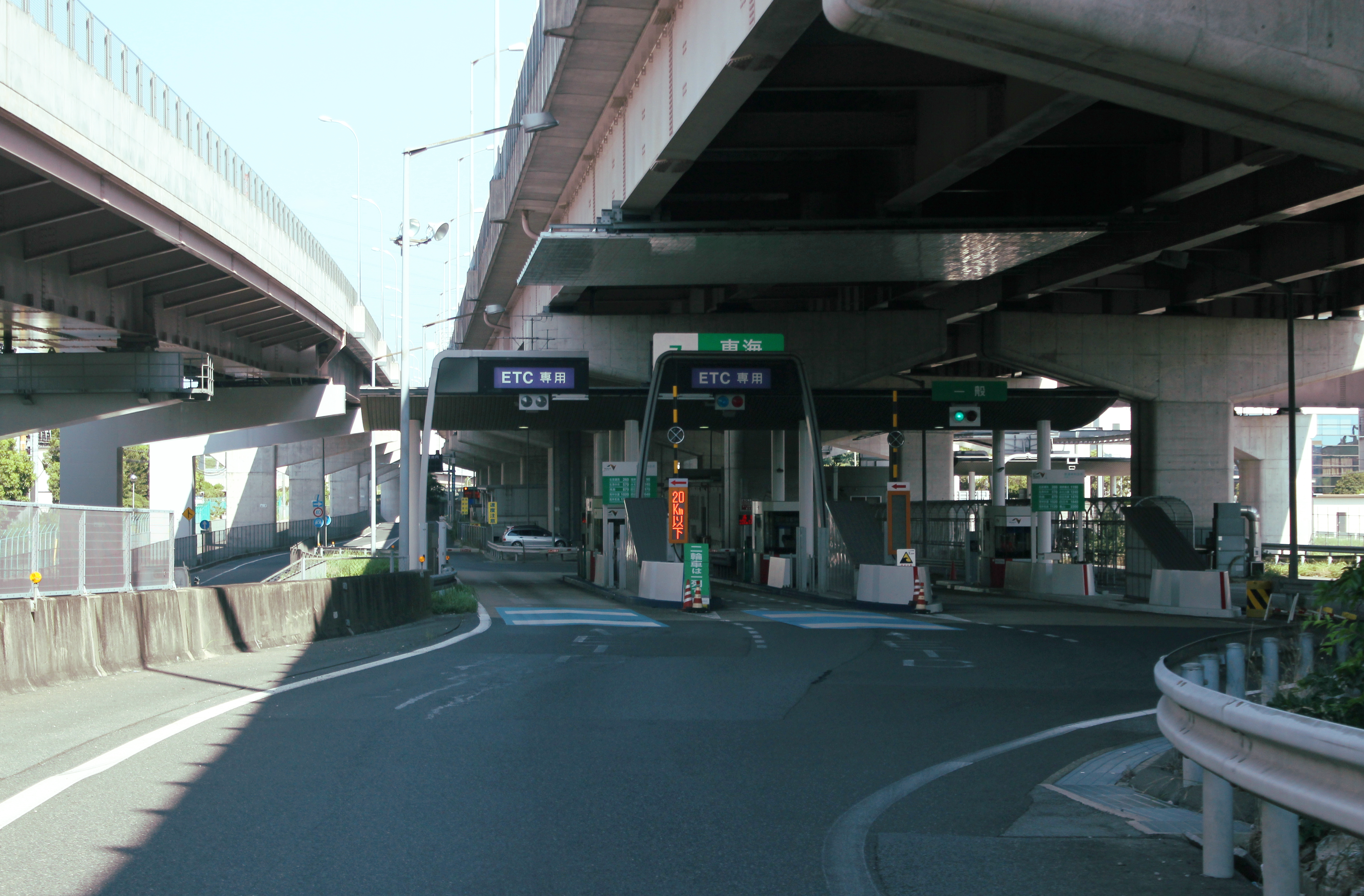 伊勢湾岸自動車道 東海IC出口料金所（四日市方面から）